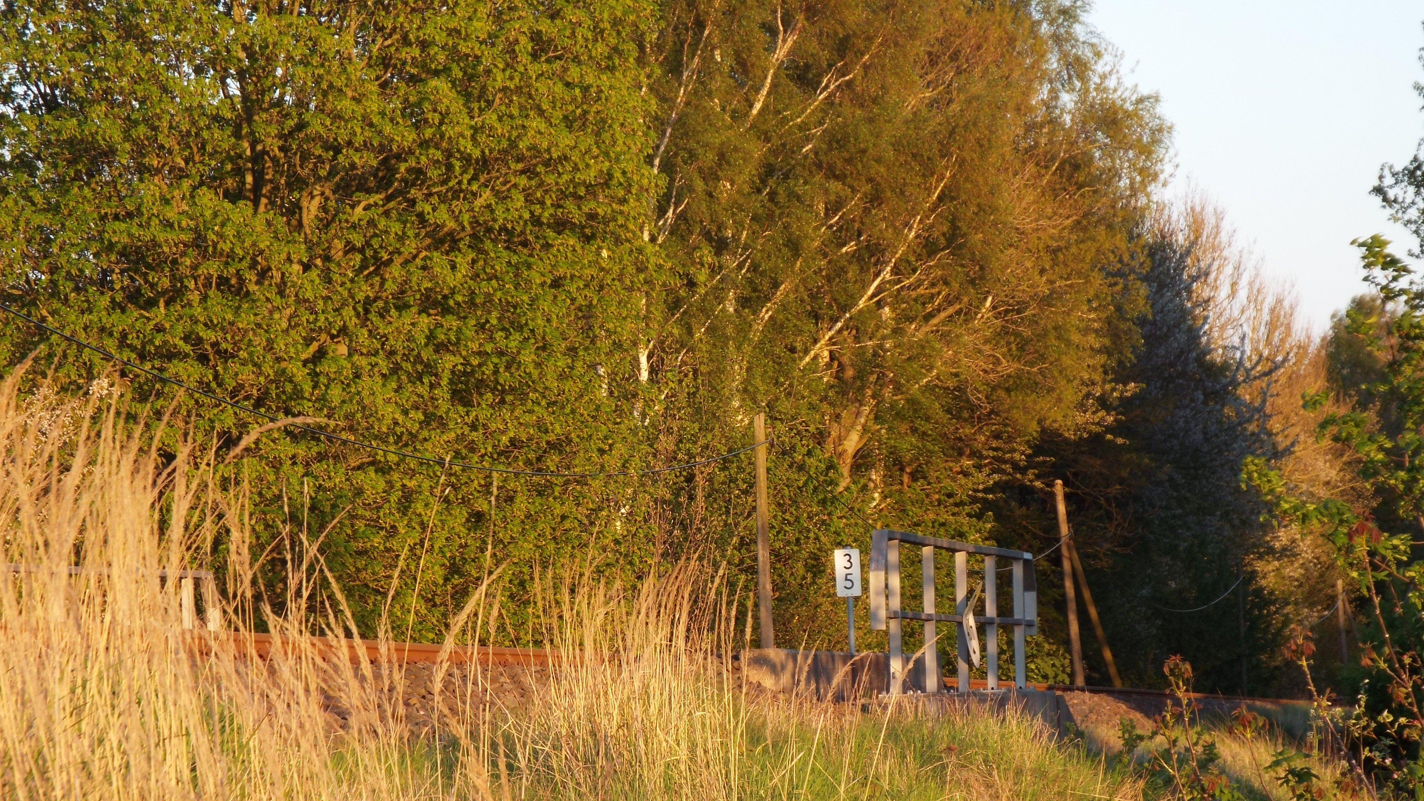 Tilzower Wald (4) Rügen